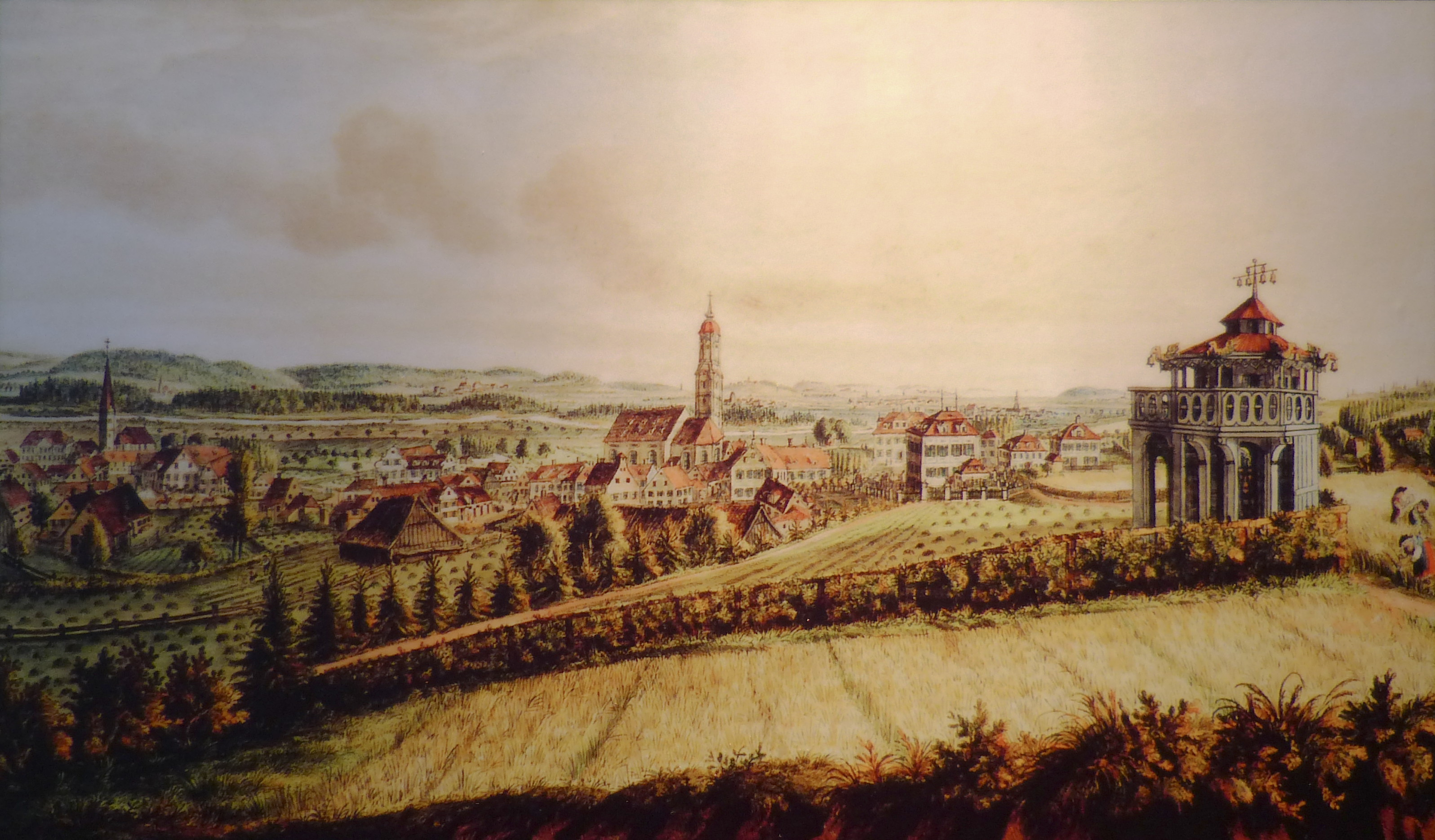 Ansicht von Göggingen bei Augsburg. Kolorierte Radierung von Johann Michael Frey, um 1790/1795. Im Vordergrund rechts der "Römerturm" im Graf Seyssel d´Aixschen Anwesen, bzw. dessen Vorgängerbau.